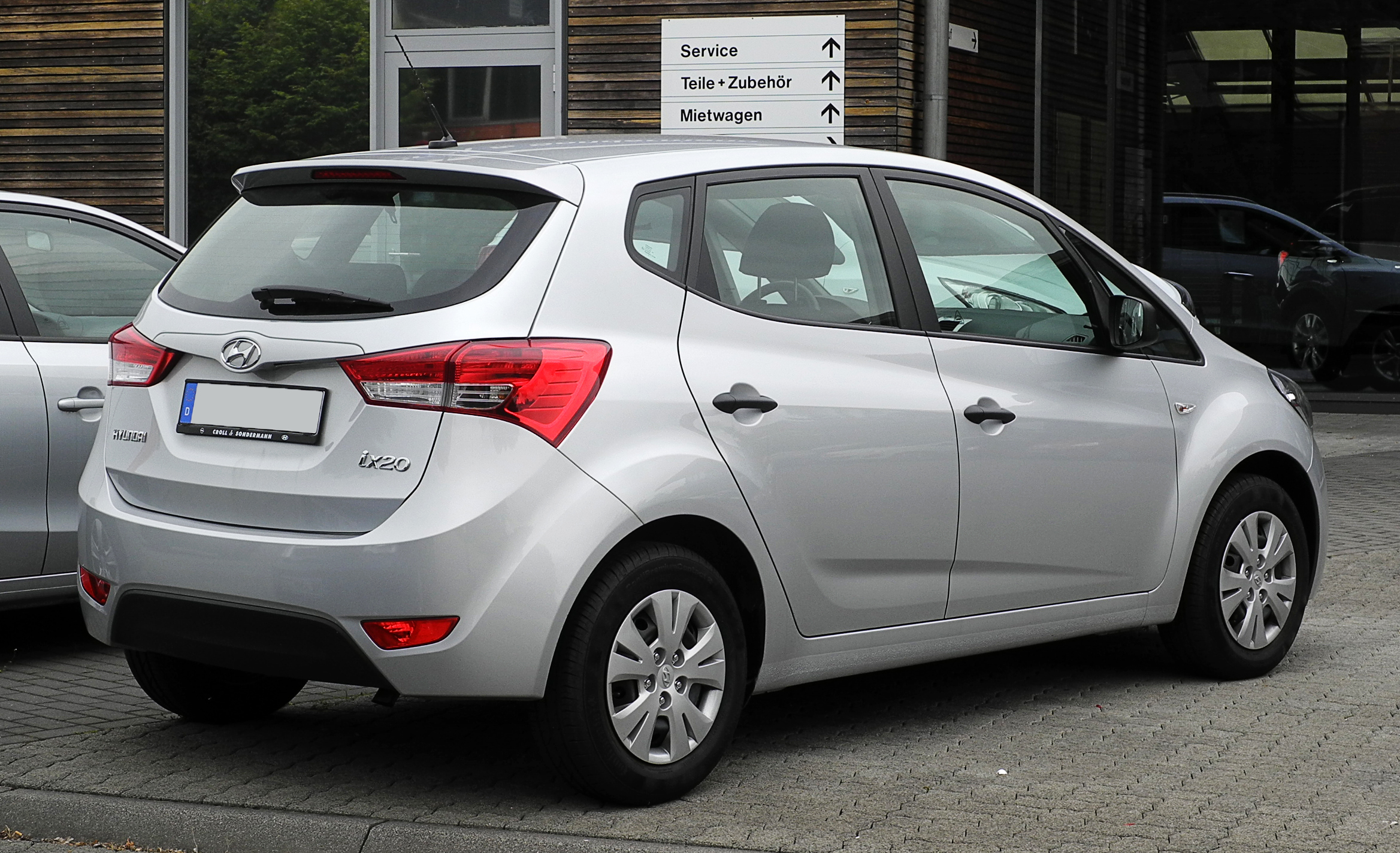 Hyundai ix20 1.4 Classic